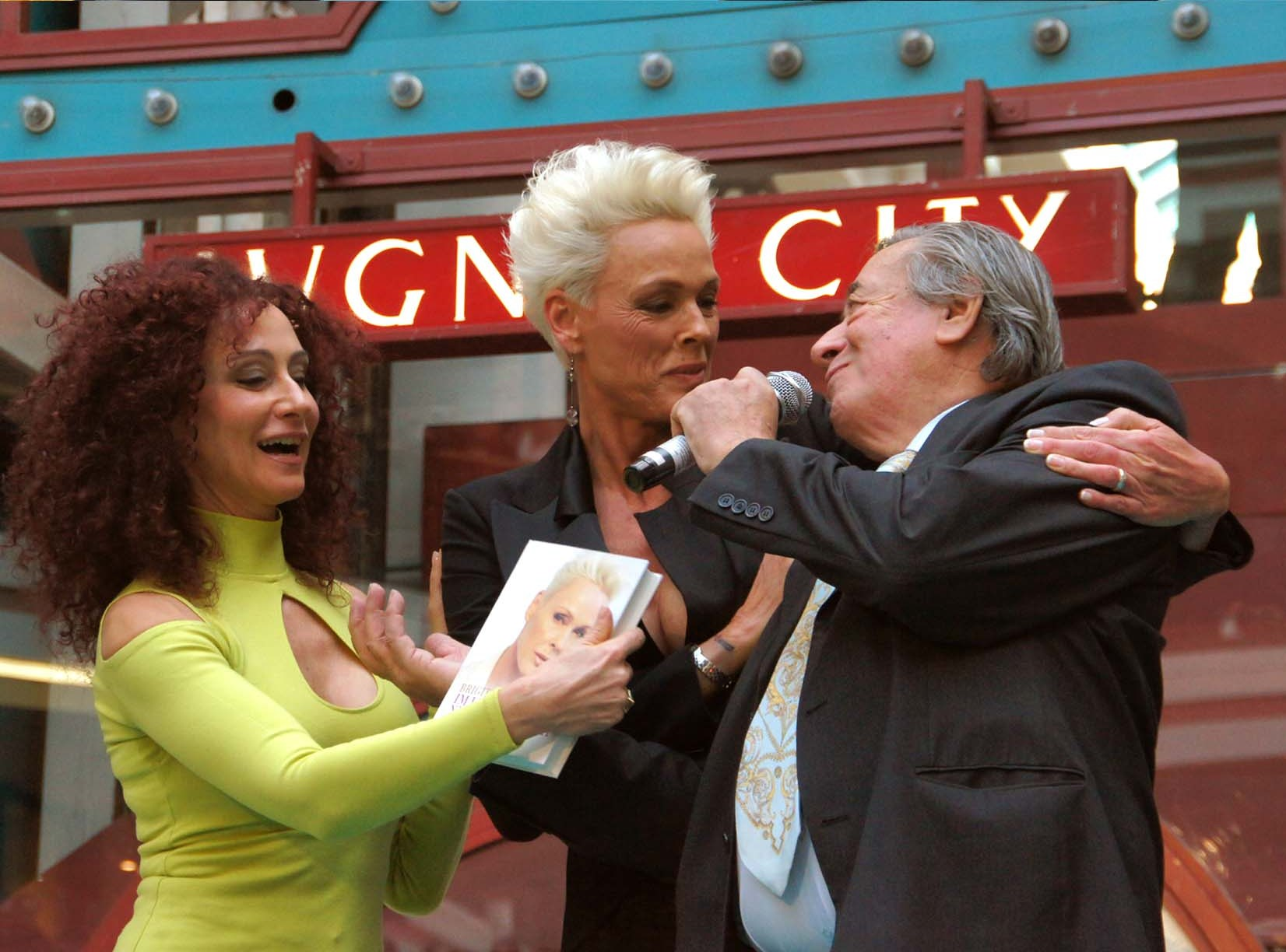 From left: Christina 'Mausi' Lugner, Brigitte Nielsen, Richard 'Mörtel' Lugner.